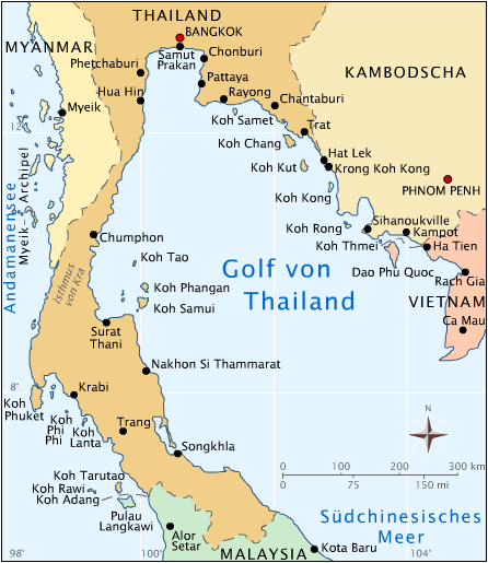 Golf von Thailand und der Isthmus von Kra Thailand Inseln: Ko Chang, Ko Samet, Ko Kut, Ko Tao, Ko Phangan, Ko Samui (Andamanensee: Ko Phuket, Ko Phi Phi, Ko Lanta, Tarutao-Nationalpark: Ko Tarutao, Ko Rawi und Ko Adang) Orte: Bangkok, Samut Prakan, Chonburi, Pattaya, Rayong, Chantaburi, Trat, Phetchaburi, Hua Hin, Chumphon, Surat Thani, Nakhon Si Thammarat, Songkhla, Krabi, Trang Kambodscha Inseln: Koh Kong, Koh Rong, Koh Thmei Orte: Phnom Penh, Krong Koh Kong, Sihanoukville, Kampot Vietnam Insel: Dao Phu Quoc Orte: Ha Tien, Rach Gia, CÃ Mau Malaysia Insel: (Andamanensee: Pulau Langkawi) Orte: Alor Setar, Kota Baru Myanmar Inseln: (Andamanensee: Myeik-Archipel) Ort: Myeik Lizenz/Quelle Dieses Bild ist sowohl unter der als auch der Lizenziert. Urheber: Manfred Werner (Benutzer:Tsui), 2004